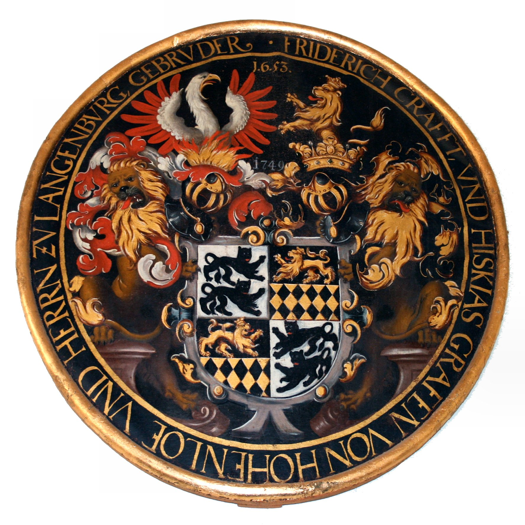 Das Hohenloher Wappen in der evangelischen Peter und Paulskirche in Pfedelbach